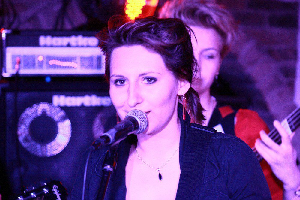 et::Liana Kolodinskaja:"Mu valgus" videovõtted 2011